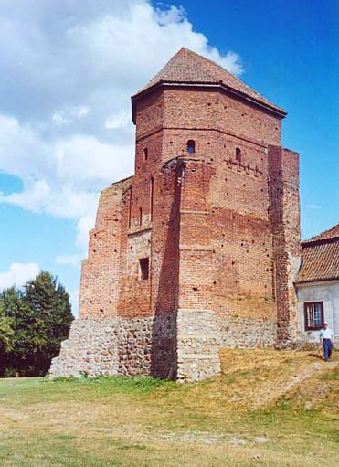 Wieża zamku Liw - zdjęcie własne z 2003 r.